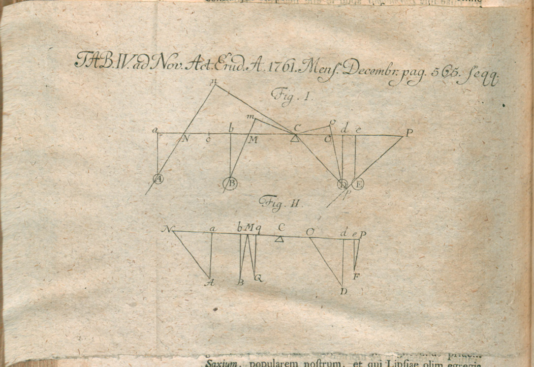 Illustration